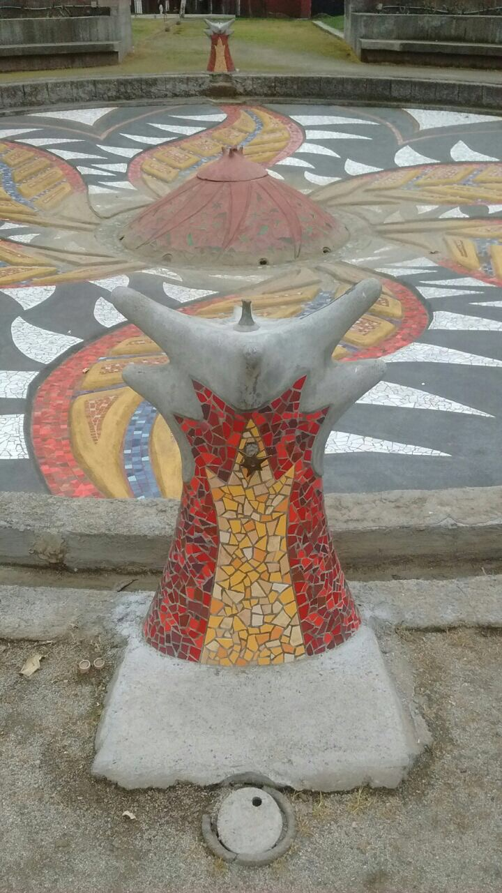 Escultura que simboliza el fuego, uno de los elementos para el diseño del parque (Agua, Fuego y aire)